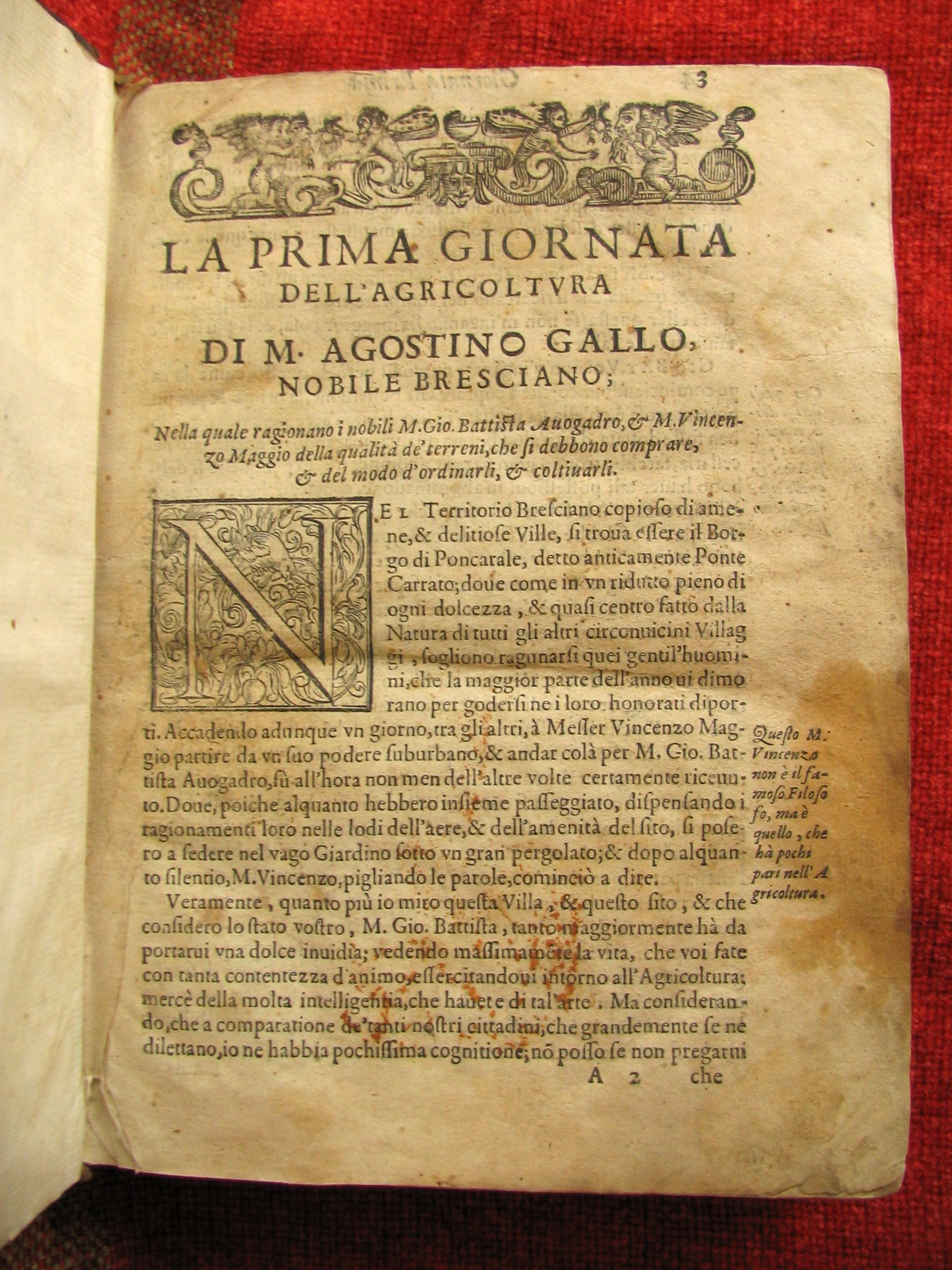 Gallo, Agostino, La primera jornada de la agricultura. Página 3